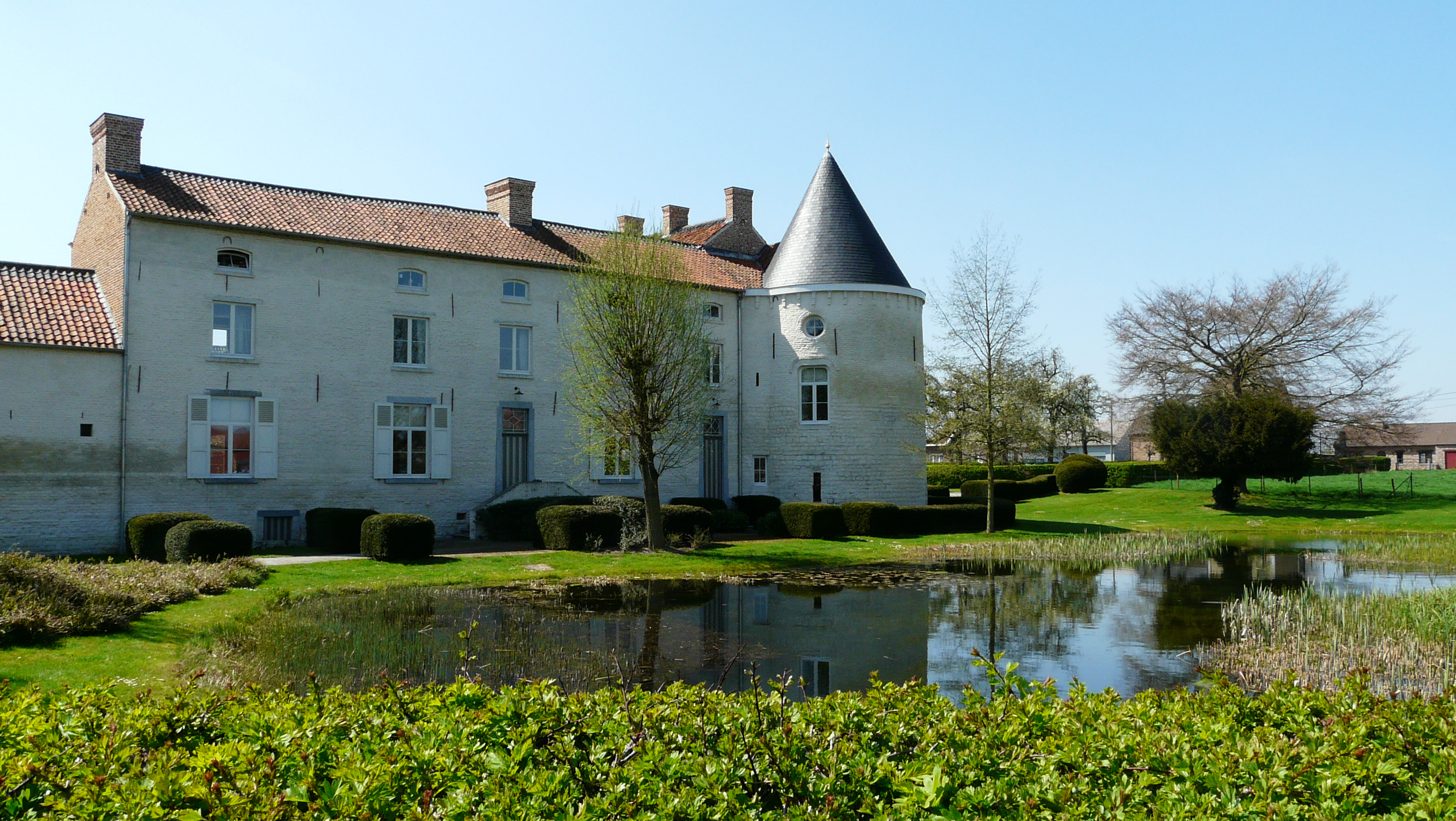 kasteel en vijver Hof ten Steen, Orsmaal, Linter